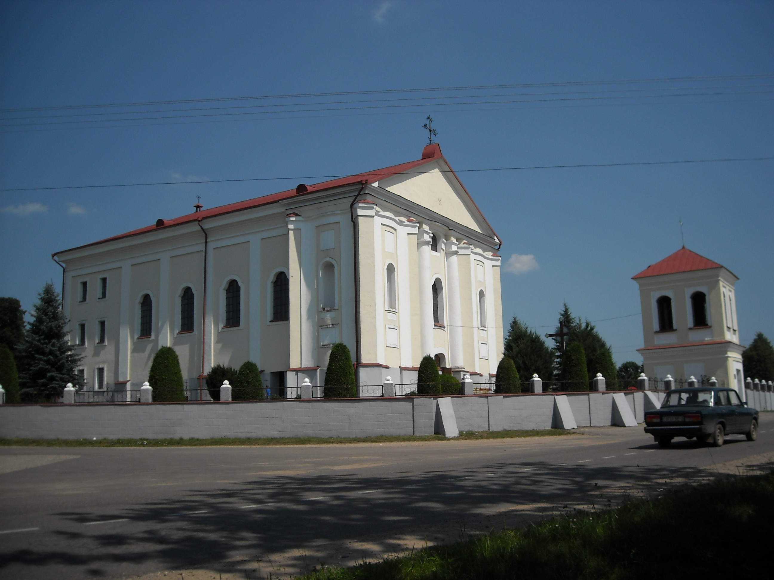 Беларуская (тарашкевіца): Касьцёл Беззаганага Зачацьця Найсьвяцейшай Панны Марыі. в. Удзела This is a photo of Belarusian heritage monument. Reference number: 212Г000417 ( WLM)